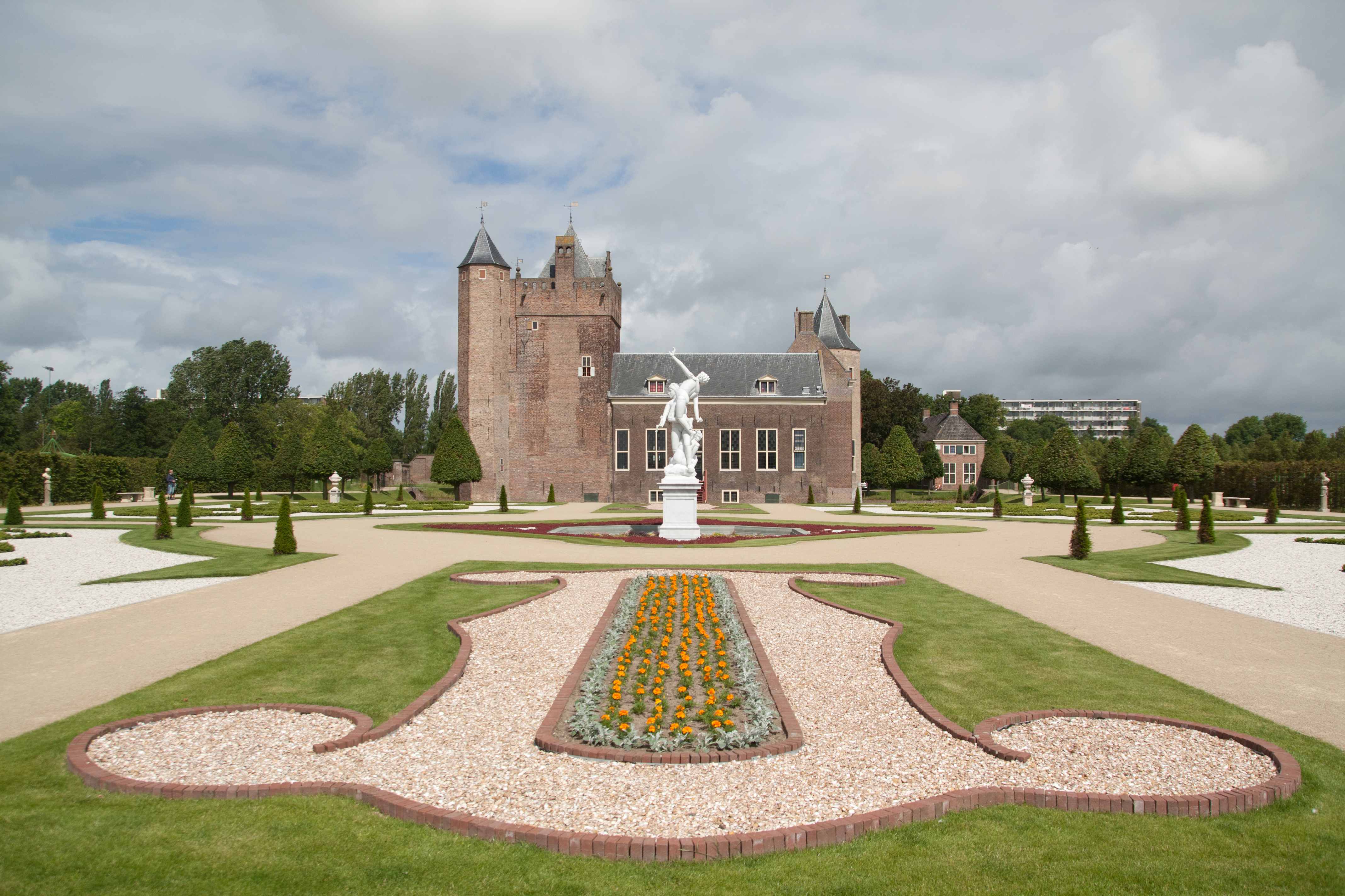 Kasteel Assumburg te Heemskerk